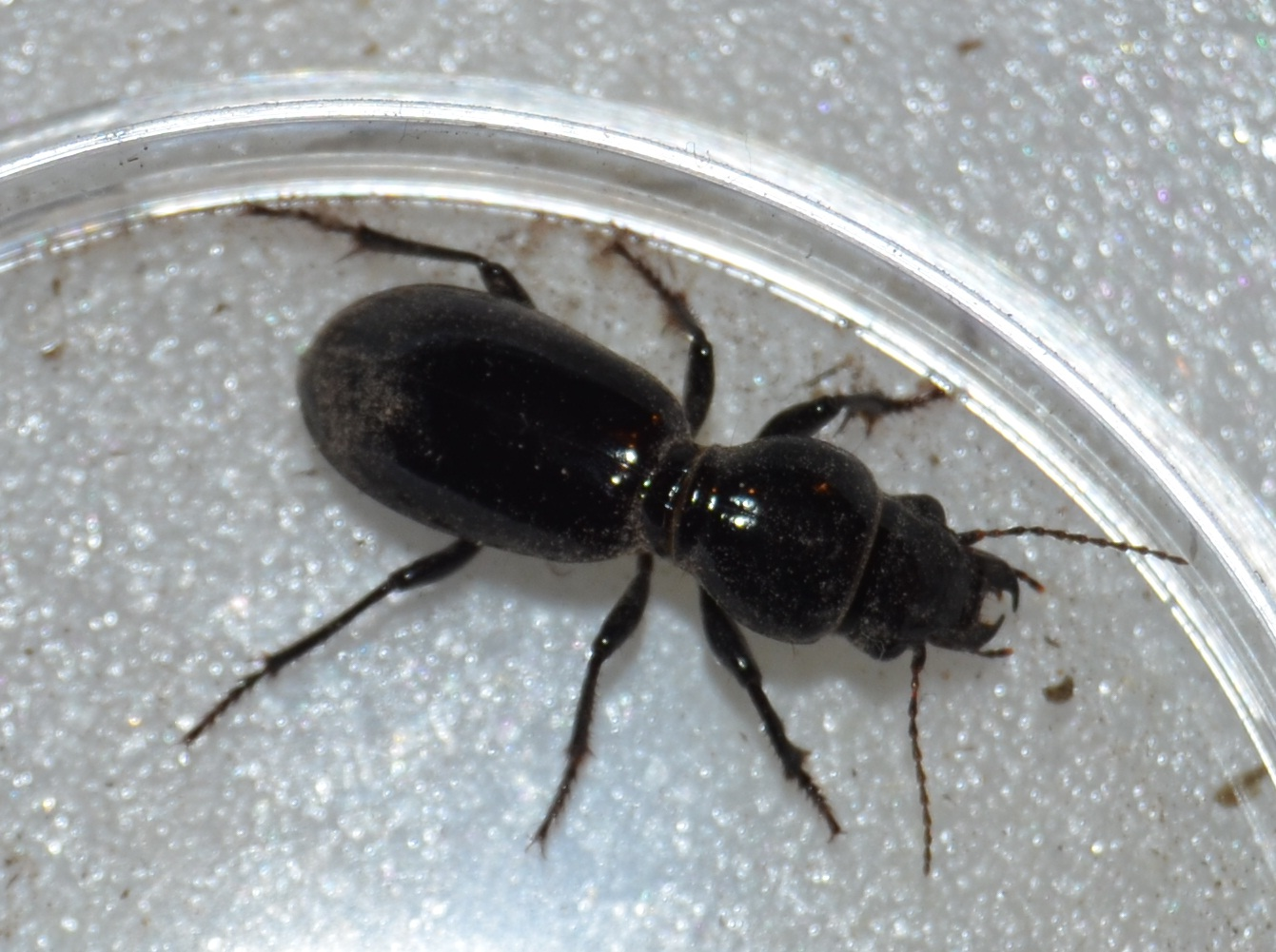 Macho de Broscus uhagoni